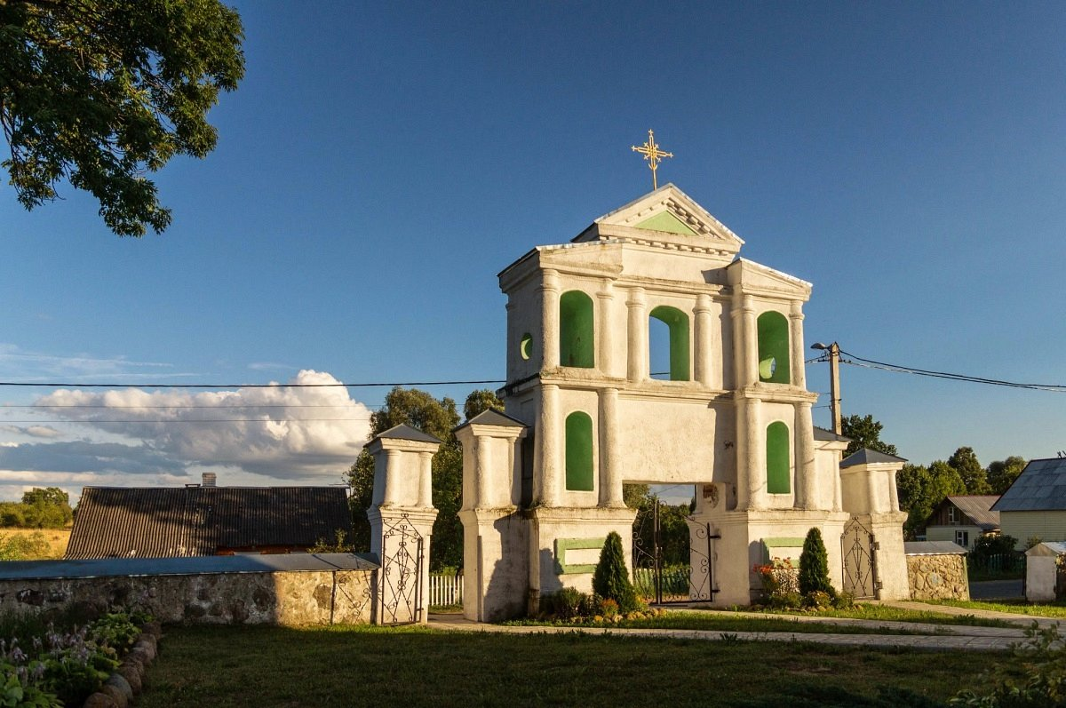 Мамаі. Царква (былы касцёл). Брама